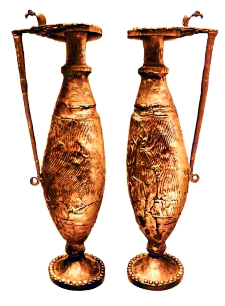 Cana - reproducere Alexandru Odobescu